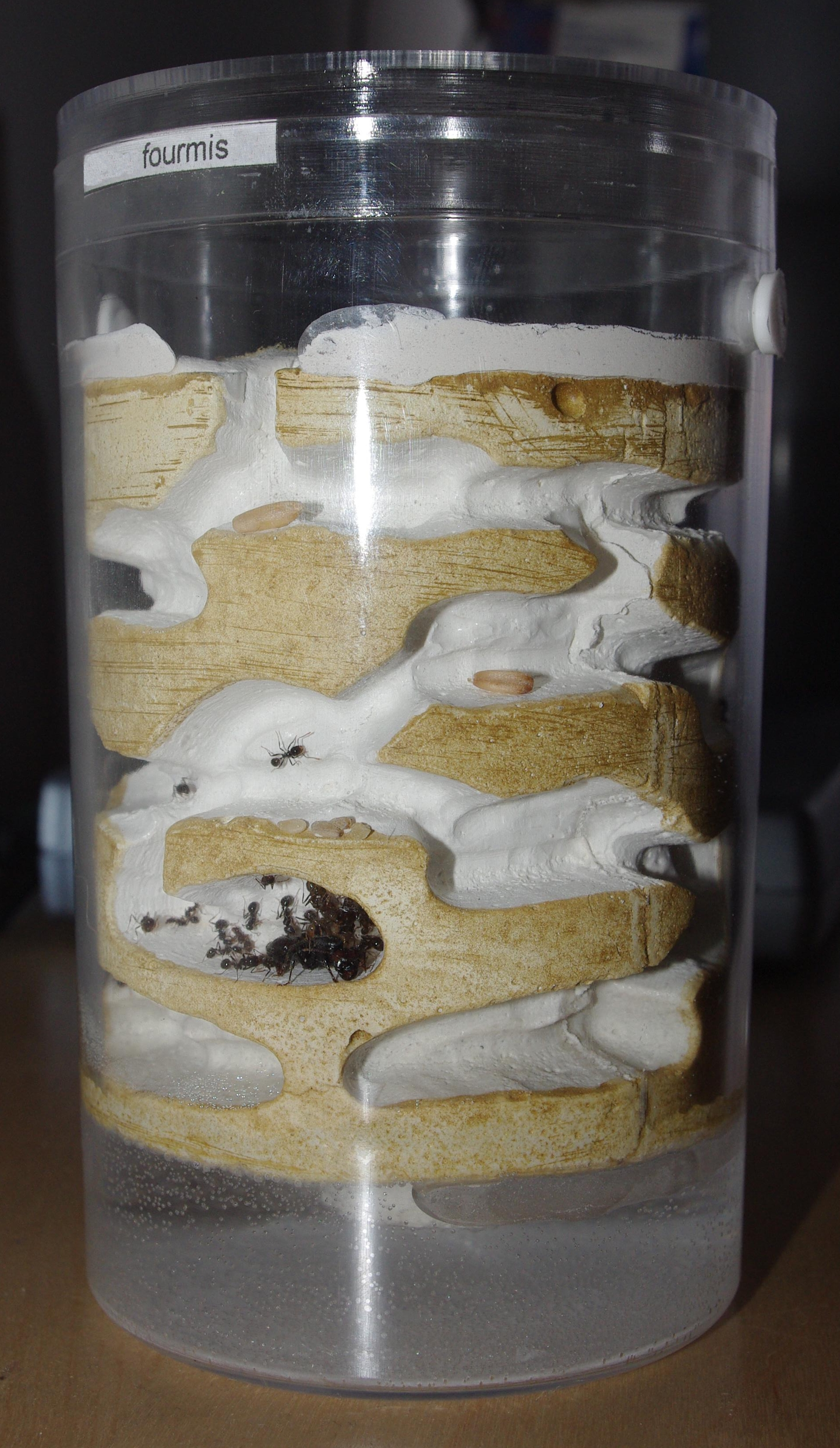 Fondation d'une colonie de Messor barbarus dans une fourmilière artificielle en plastique et pierre reconstituée avec des galeries pré-creusées.